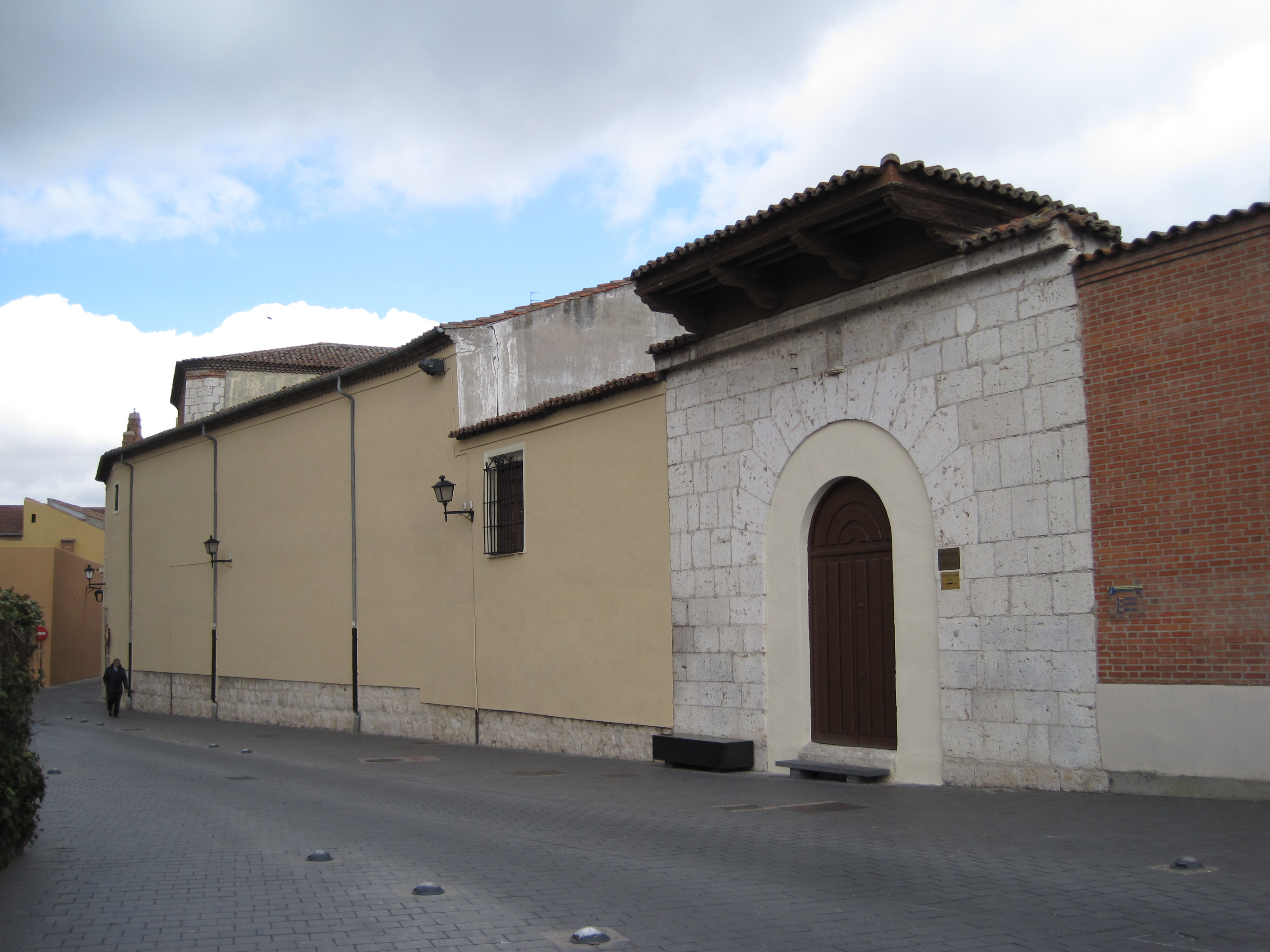 Vista exterior del monasterio de Santa Isabel de Hungría, Valladolid (España).